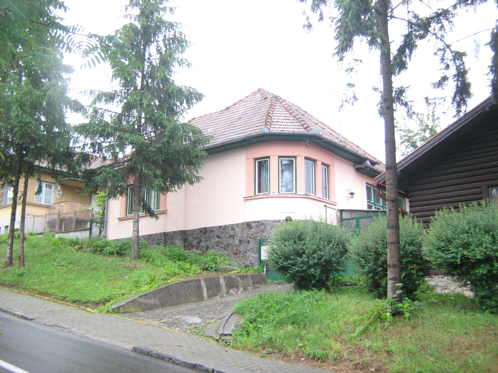 Lakóhely Marosvásárhelyen a Nyár utcában, ahol élt és alkotott Tóth István költőRomână: Locuinta in Targu Mures, in care a locuit si a lucrat poetul Tóth István